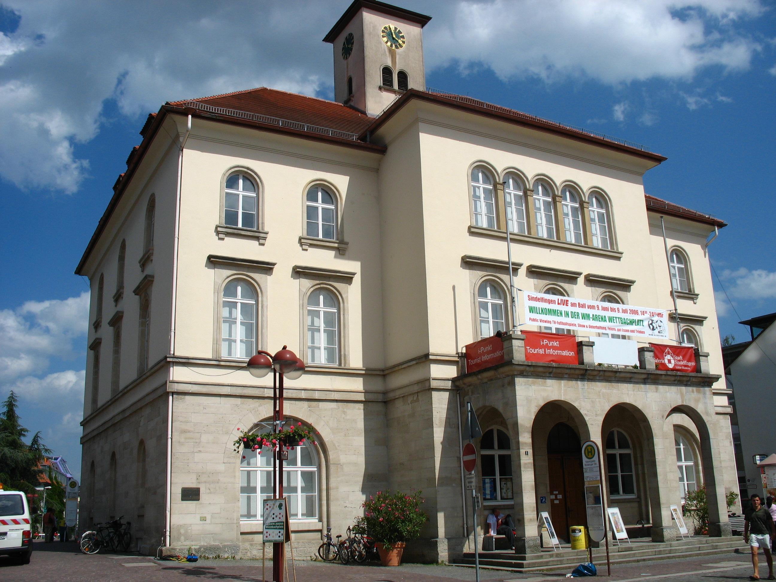 Mittleres Rathaus von Sindelfingen am Sindelfinger Marktplatz. Sitz der Galerie der Stadt Sindelfingen und der Tourist Information